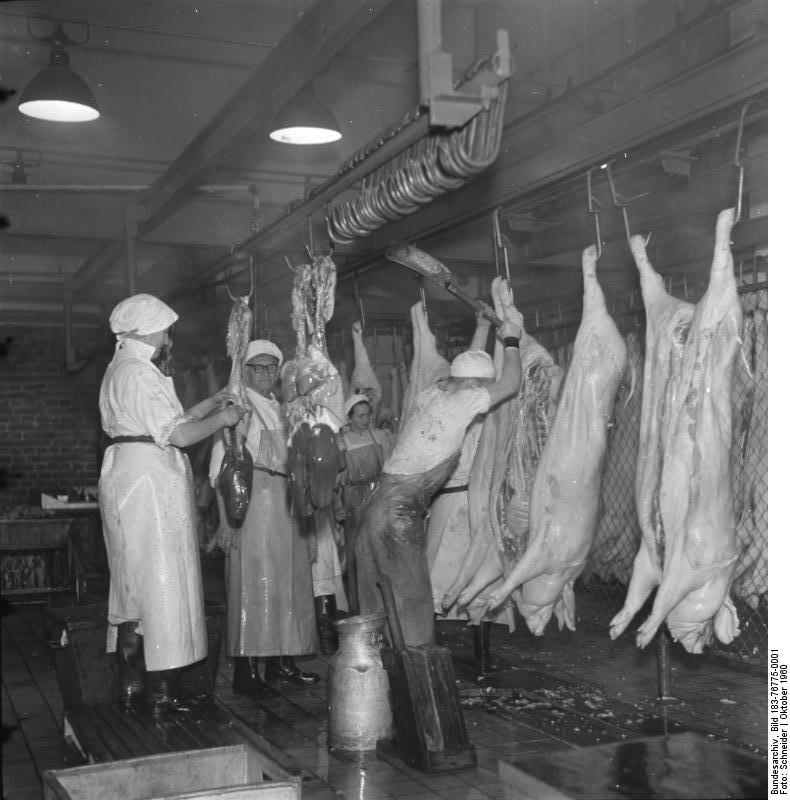 Fleischkombinat Eisenhüttenstadt Zentralbild/Schneider, 4.10.1960 Fleischkombinat Stalinstadt Ca. 7840 t Fleisch- und Wurstwaren, verlassen jährlich das Fleischkombinat Stalinstadt, die jedoch nicht nur auf die Tische der Bevölkerung unserer Republik gelangen, sondern auch ins Ausland geliefert werden. So exportiert das Kombinat in diesem Jahr beispielsweise Frischschinken nach Paris, Rindfleischkonserven nach Polen. Allein 900 Tonnen Schweinehälften werden nach Westberlin geliefert. Der Betrieb wurde 1959 Sieger im Wettbewerb der fleischverarbeitenden Industrie im Bezirk Frankfurt/Oder und hat auch im ersten Quartal 1960 das Siegerbanner errungen. 76 775/1N